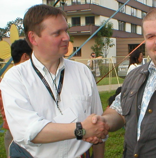 Tomasz Skowroński w Zakopanem w czasie Międzynarodowego Festiwalu Folkloru Ziem Górskich